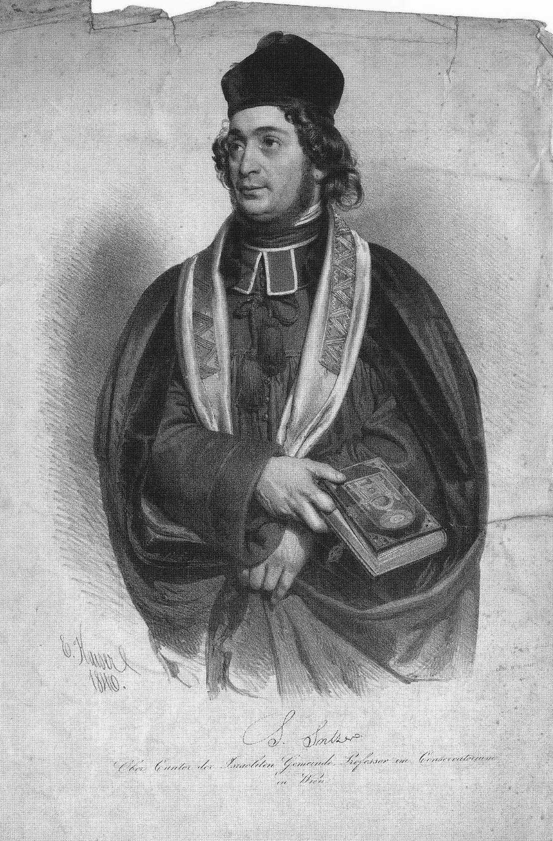 Salomon Sulzer (1804–1890)